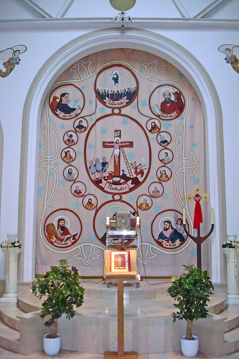 Vorhang vor dem Altarraum der syrisch-orthodoxen St.-Stephanus-Kirche Gütersloh